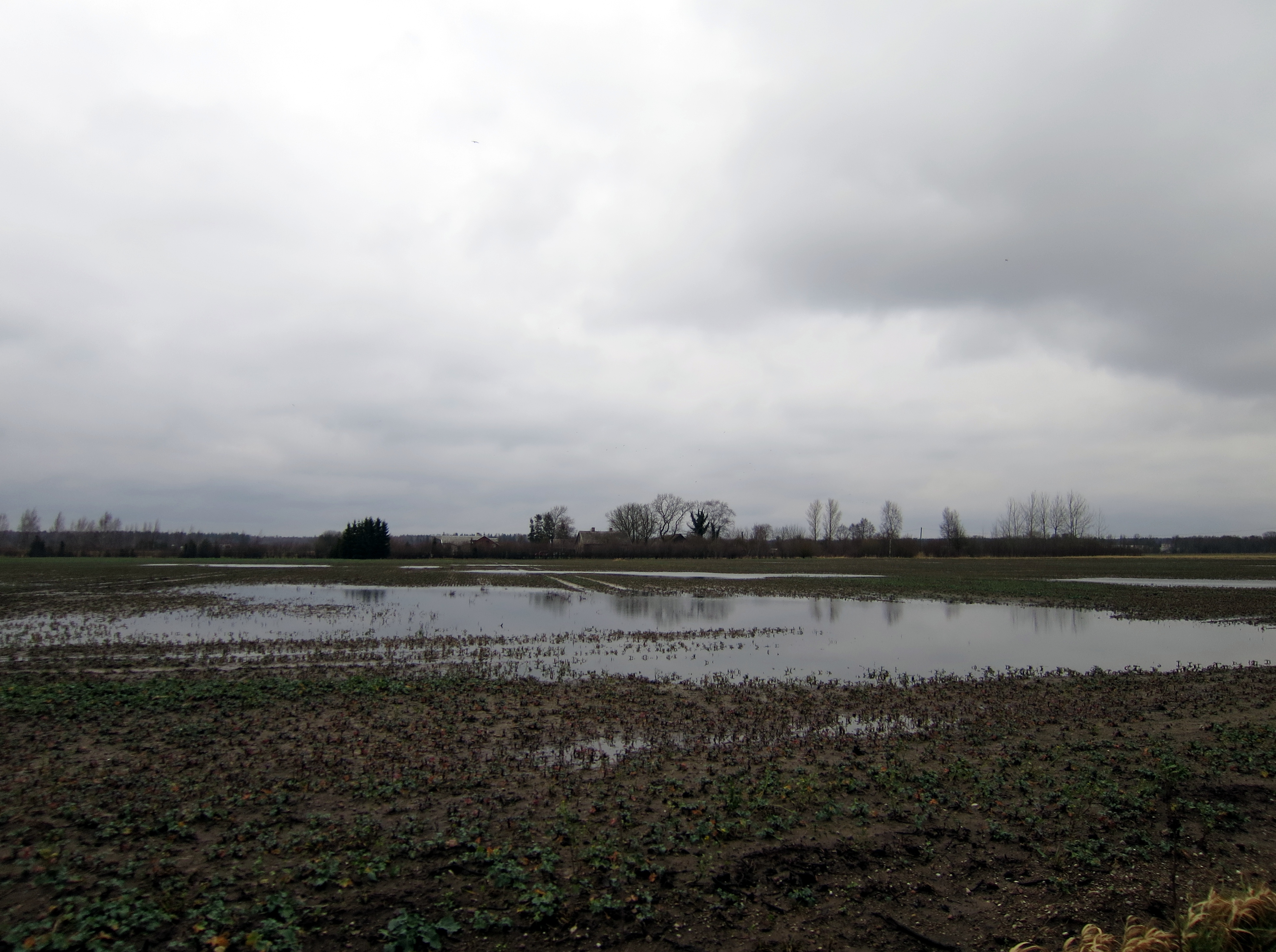 Applūduši lauki Grobiņas pagastā, skats no V1222